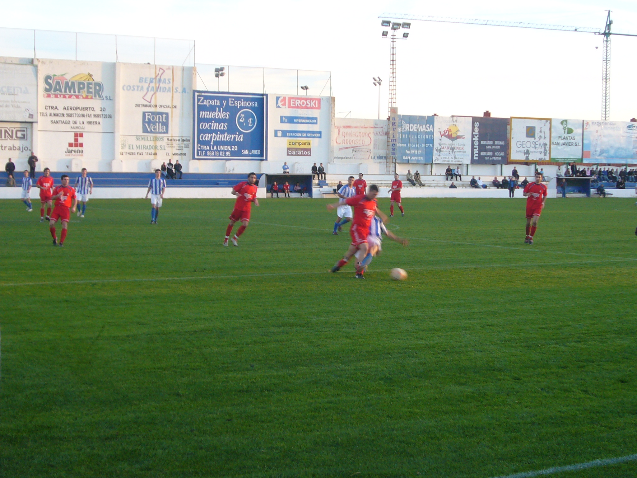 Jugada de un partido de Mar Menor en la temporada 2008/09